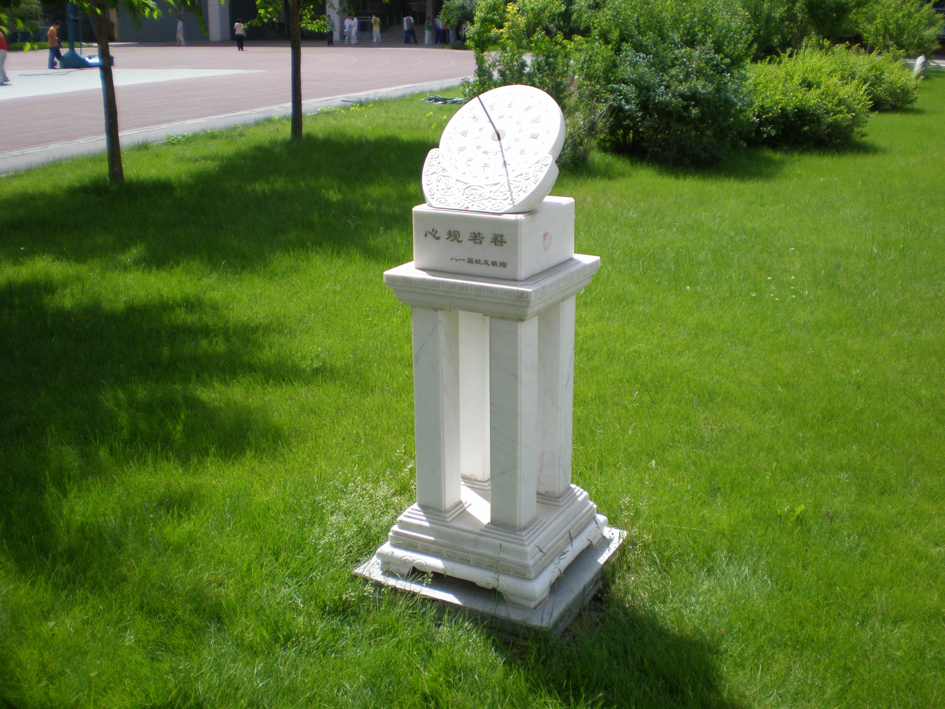 心规若晷,乌鲁木齐市第一中学